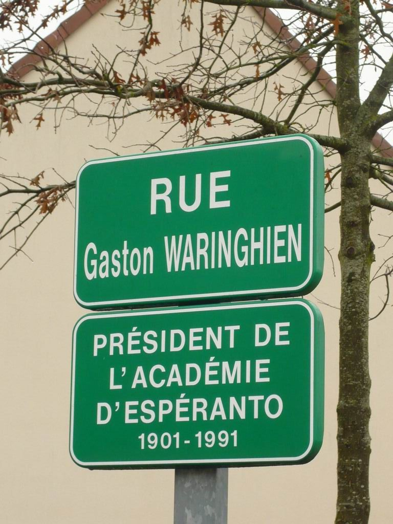 La strato Waringhien en Aigné, Francio, urbo de lia morto.